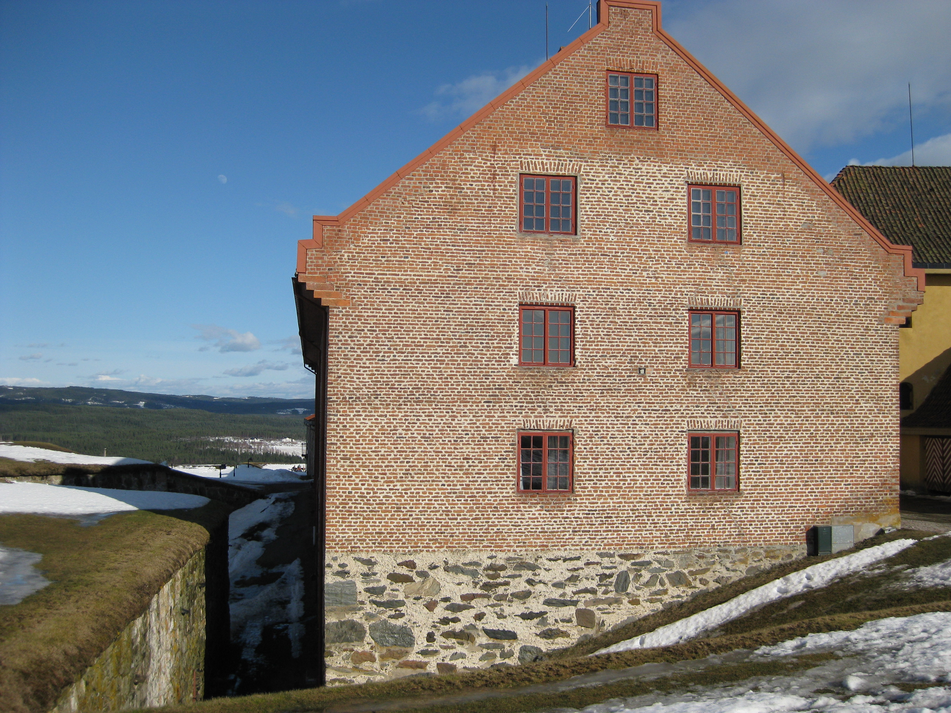 Den nye barakke fra 1788 ved Kongsvinger festning